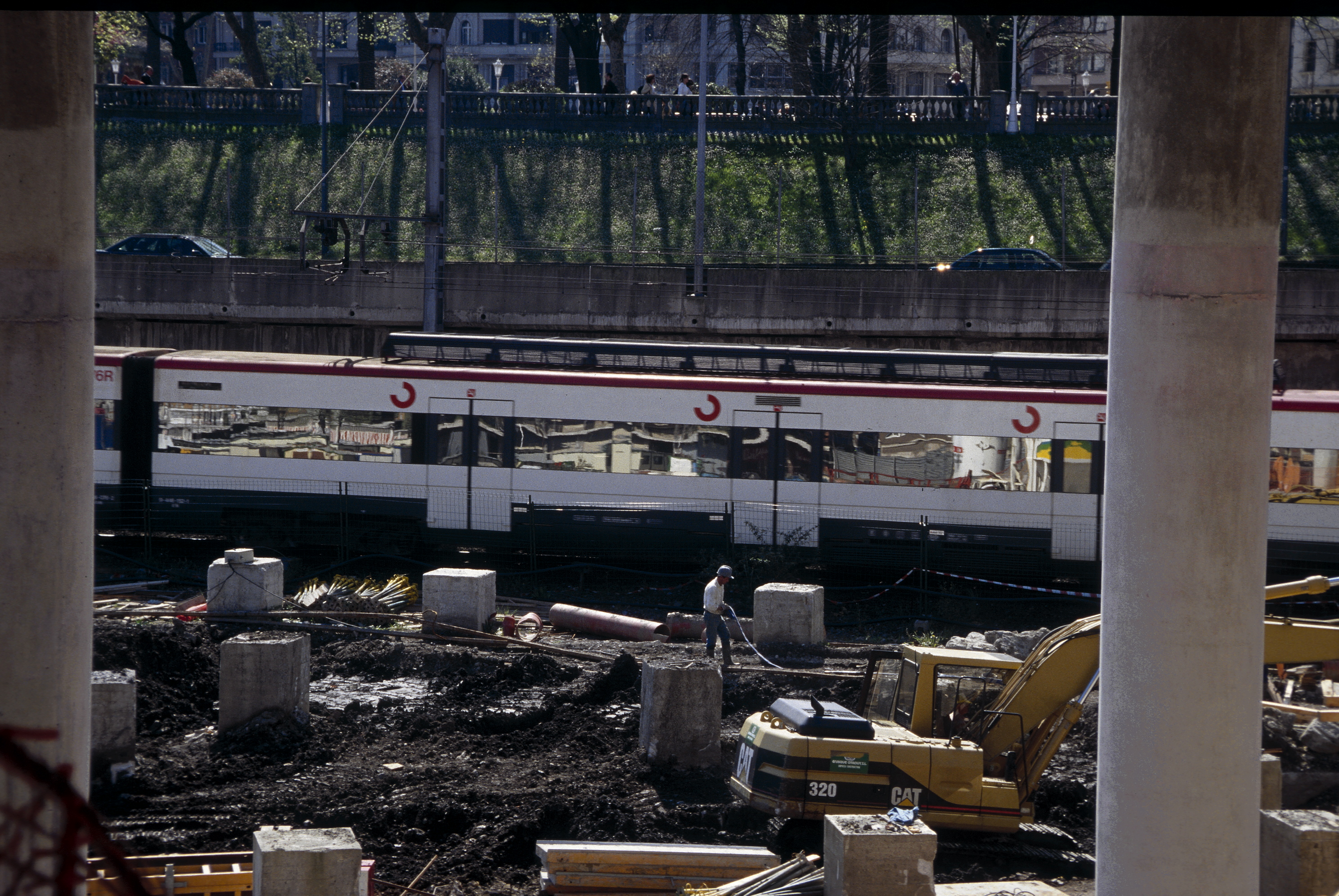 Renfeko Aldirien trena Euskalduna Jauregiaren eraikitze-lanen ondotik pasatzen